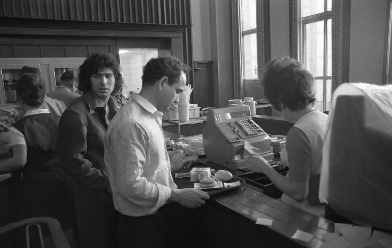 VW-Werk, Wolfsburg Kantine